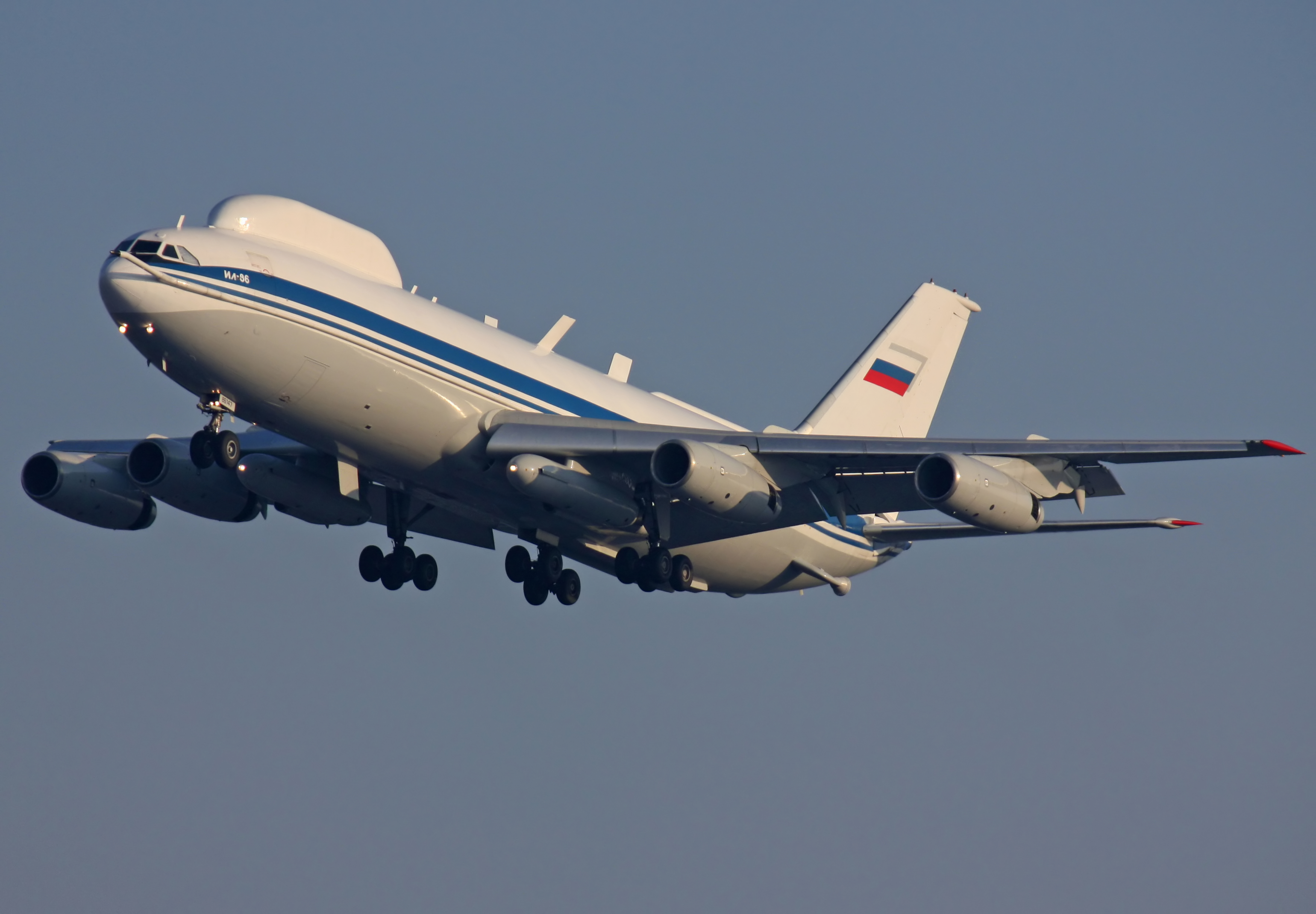 IIlyushin Il-86VKP(Il-80)